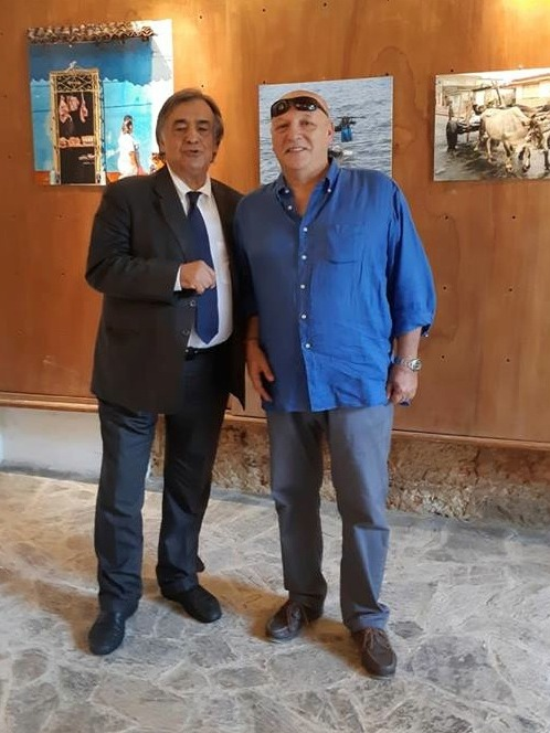 Il Sindaco di Palermo Leoluca Orlando insieme al fotografo Giangiorgio Perricone al Festival del Viaggio 2018 presso Villa Niscemi a Palermo